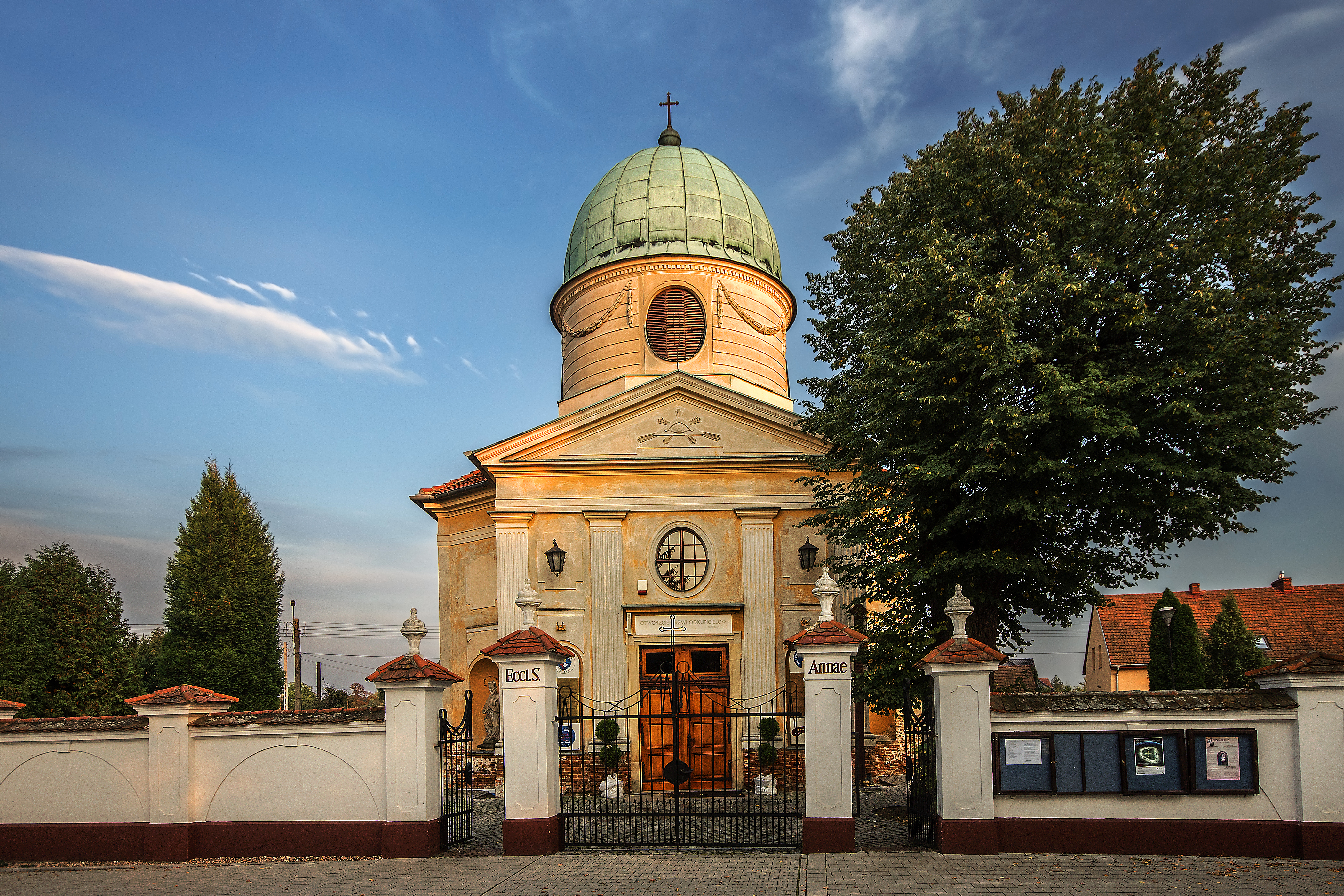 Wrocław, kościół p.w. św. Anny, poł. XVI, XVIII